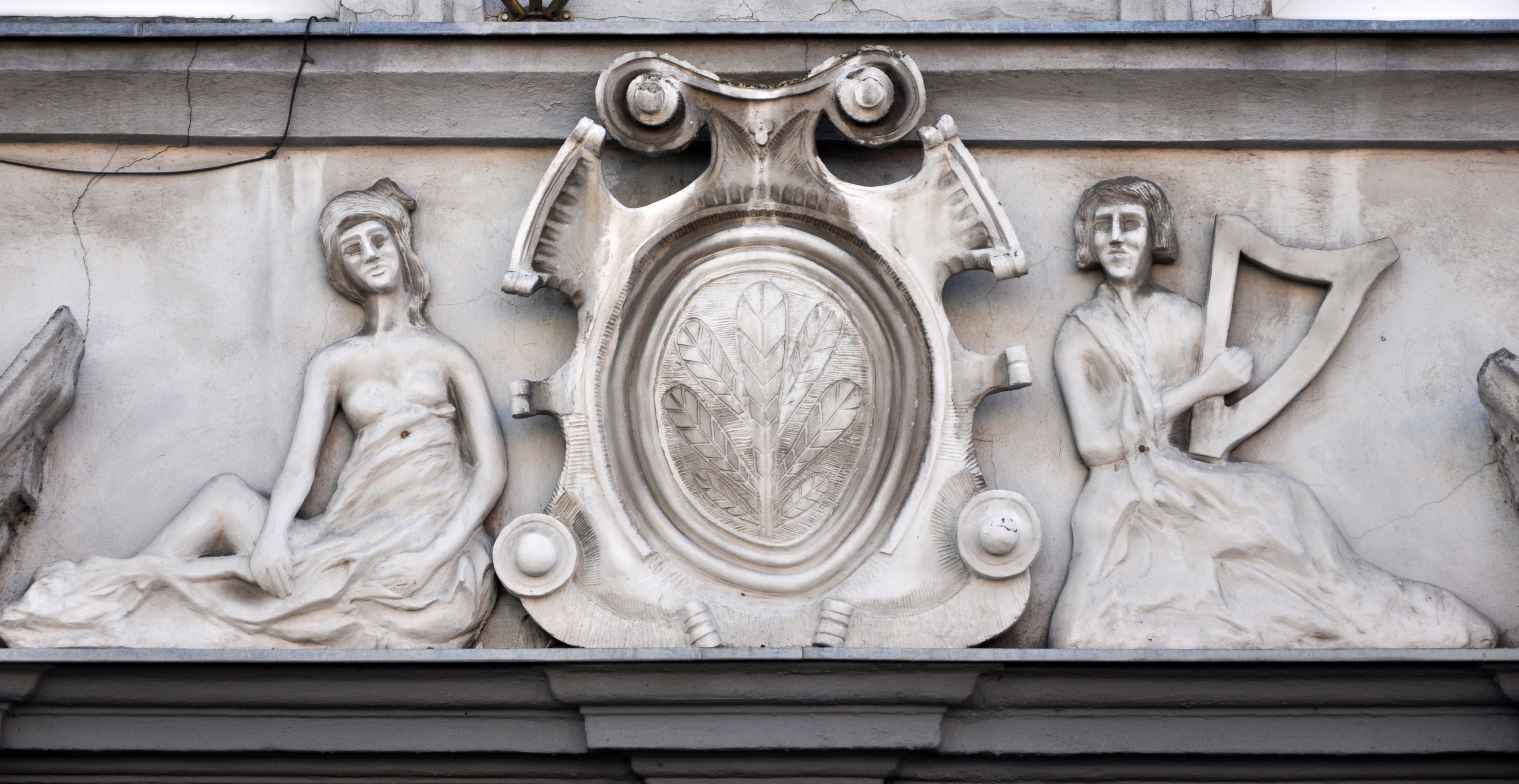 Ząbkowice Śląskie, Dom Stanów Ziemskich, XVIII